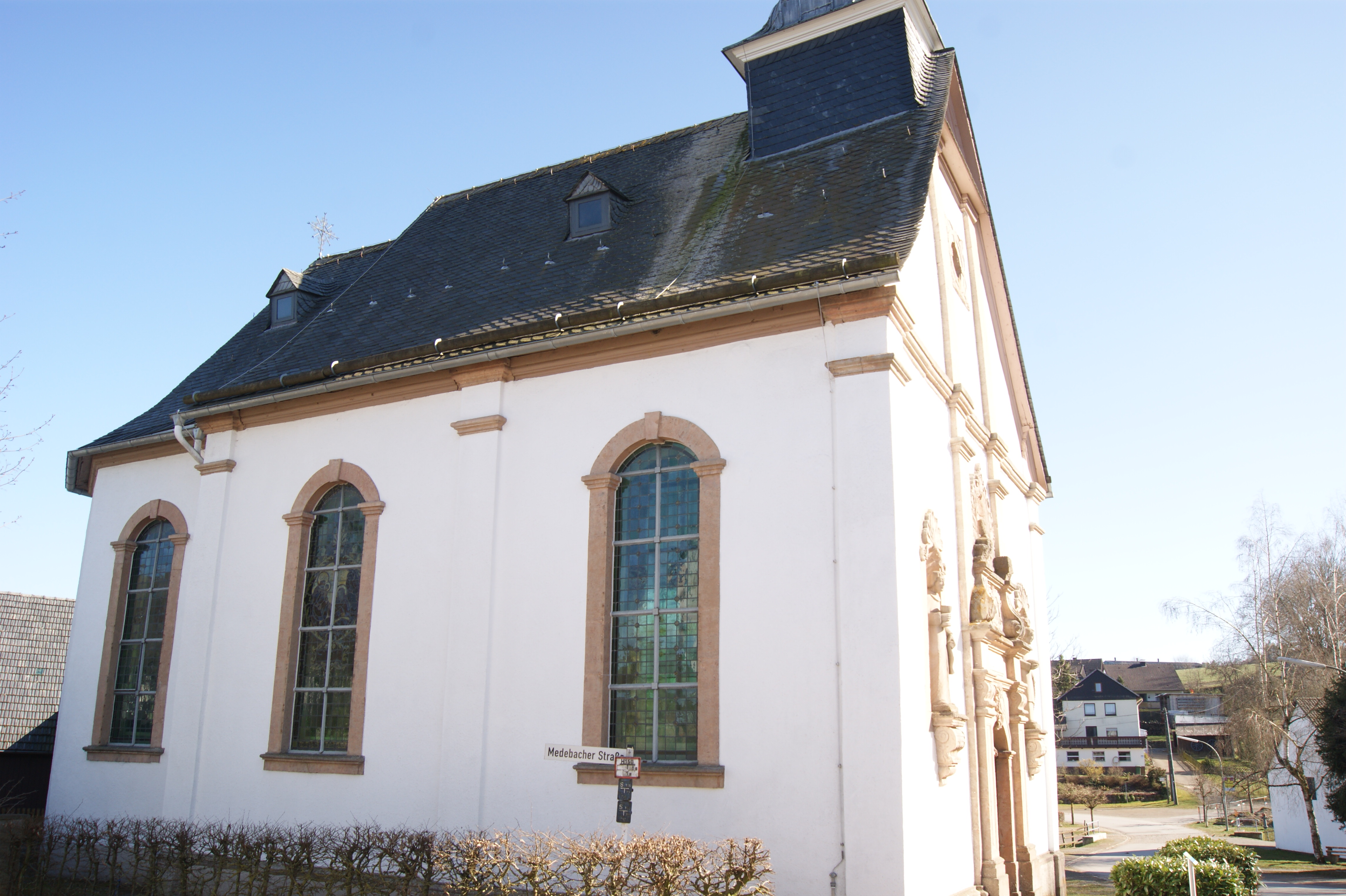 Westansicht der Kapelle